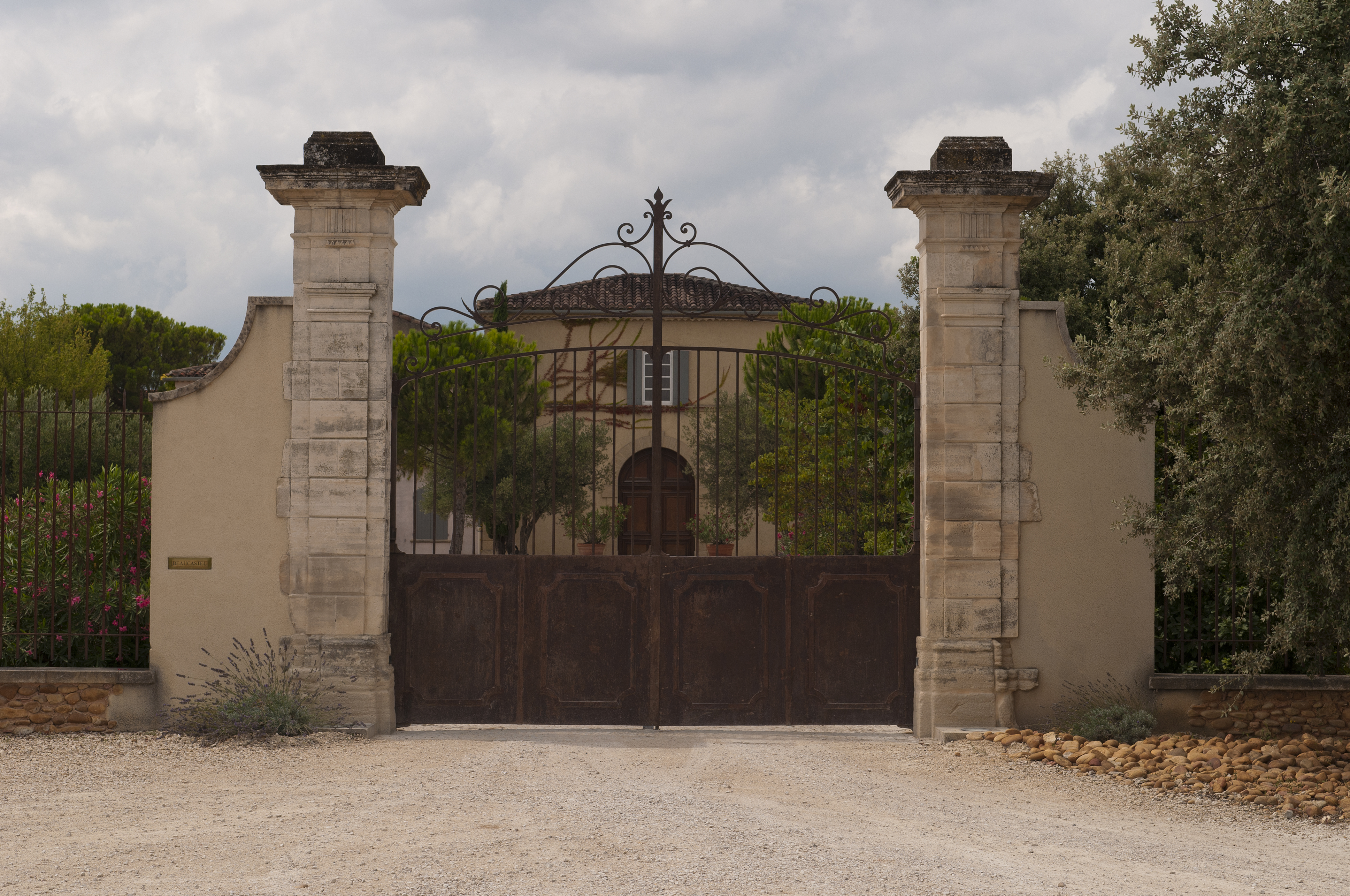 Entrée du Château de Beaucastel à Courthézon